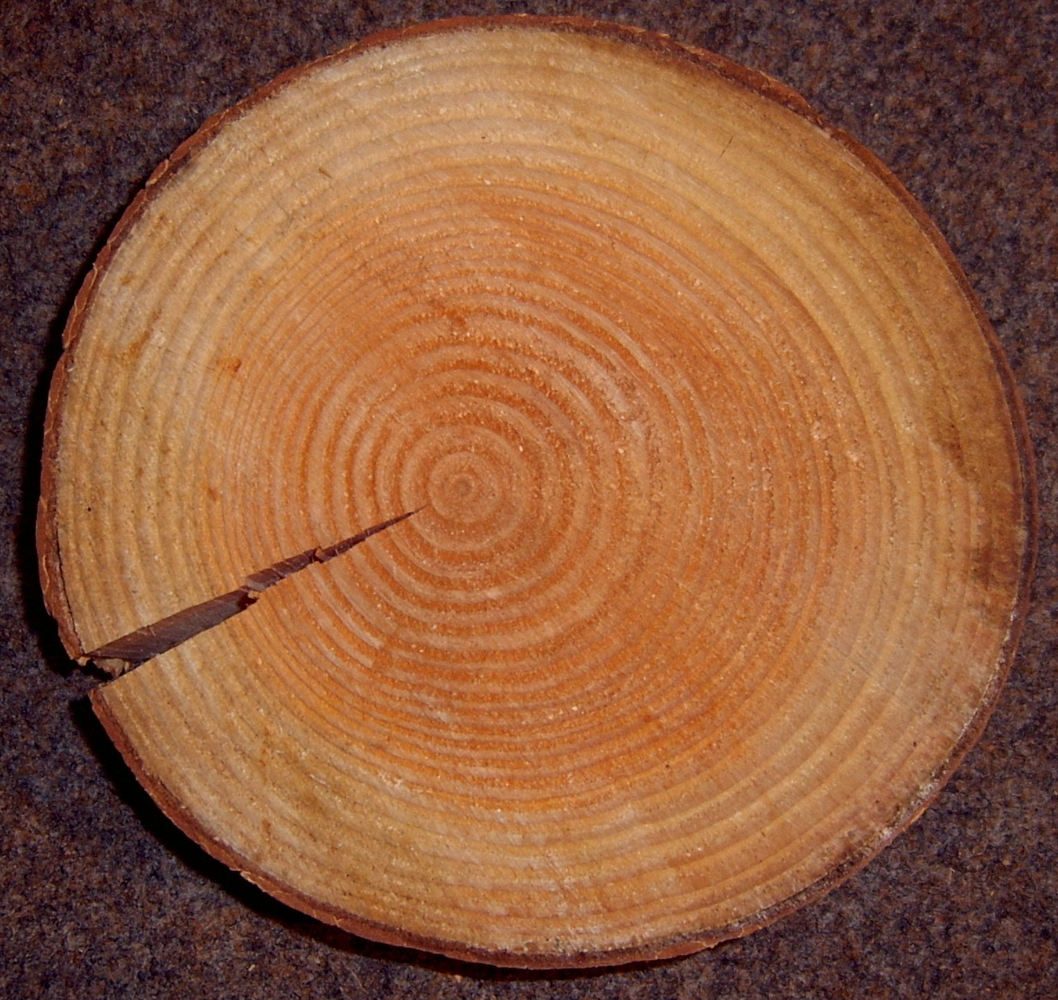 Foto taken by Lumbar 16:20, 6 November 2005 (UTC) in Osnabrück